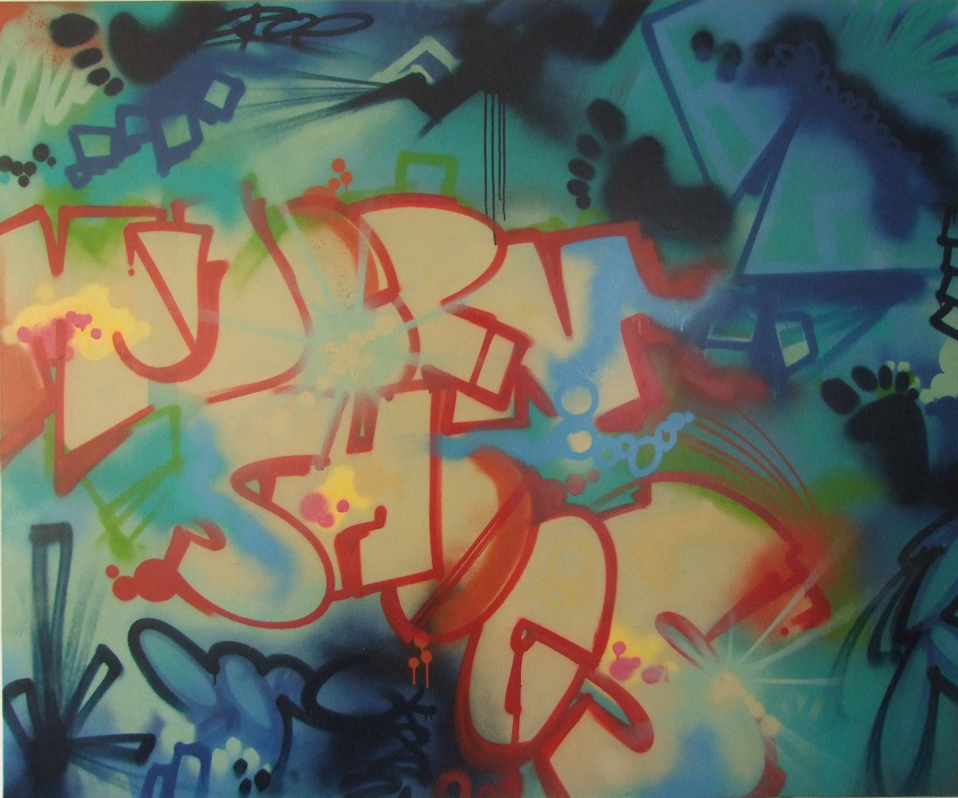 Kaos zur Kunstmeile Kurfürstendamm 1988, Leinen auf Keilrahmen, 180 x 150 cm